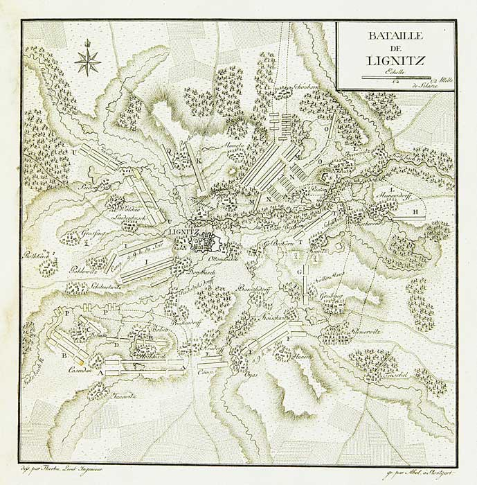 План сражения при Лигнице